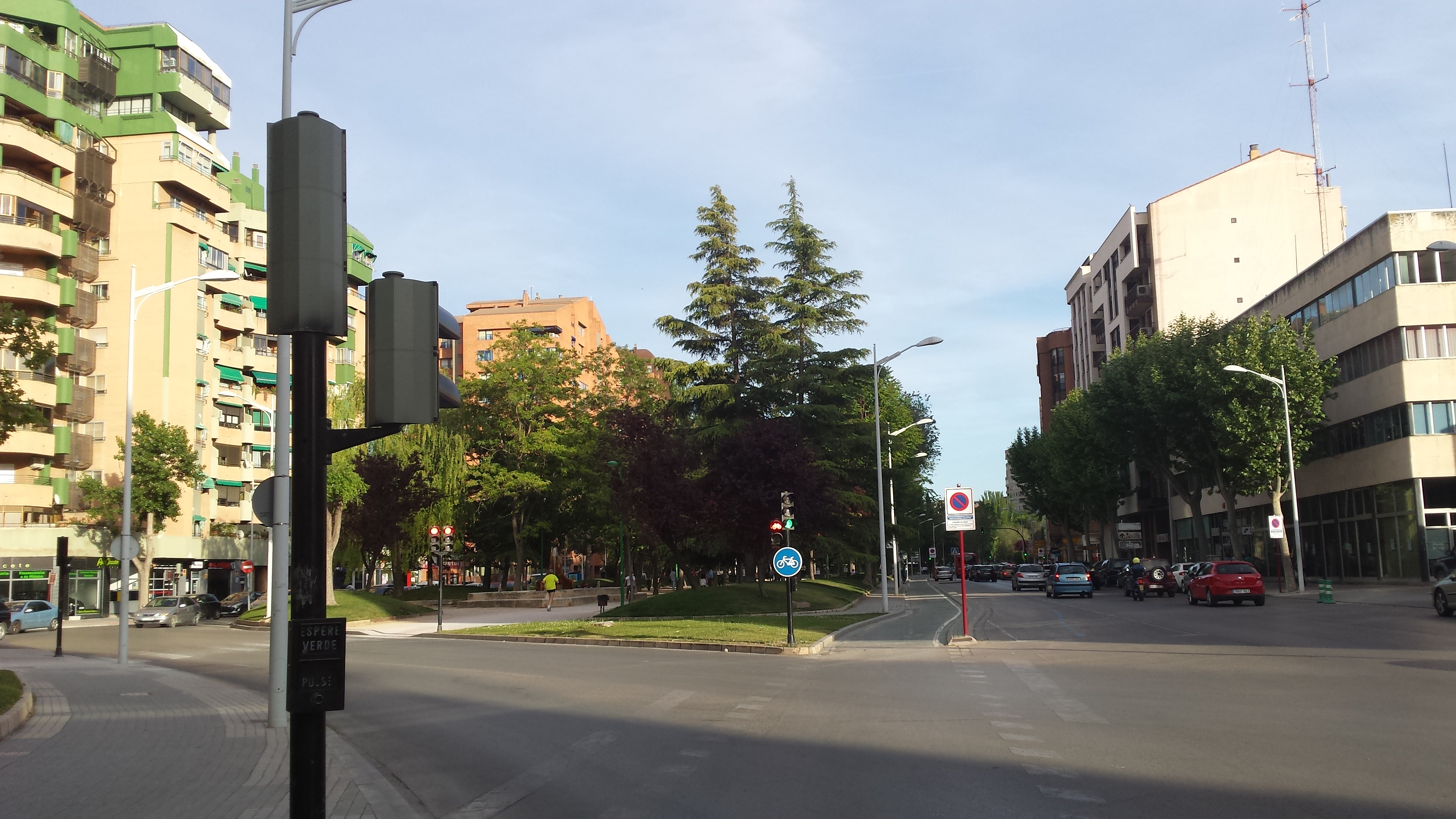 Paseo de la Cuba. Albacete